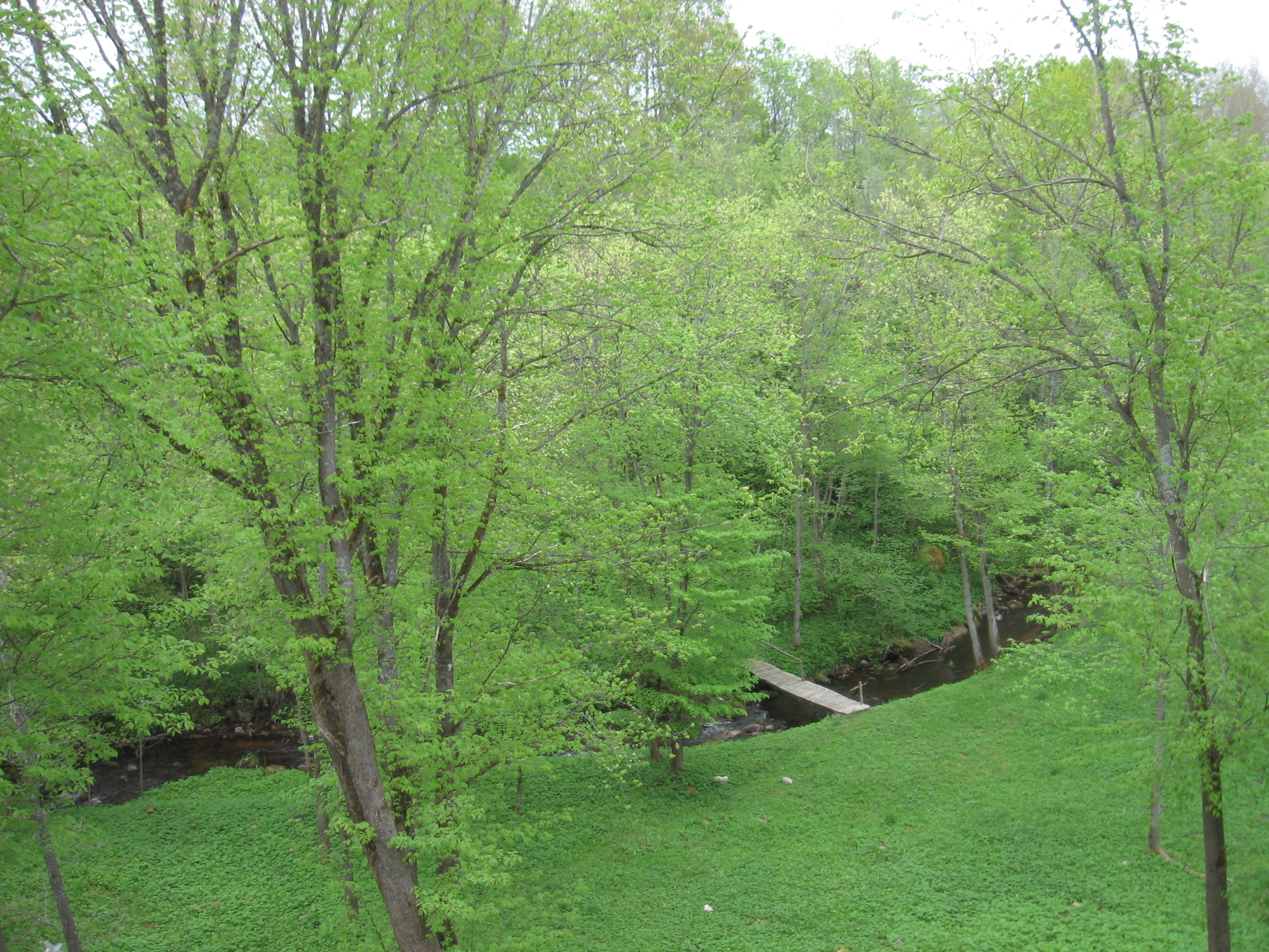 Meeksi oja Vana-Vastselinna linnuse juures